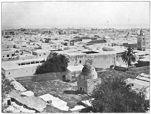 "Gezicht op Tunis. Aan den gezichtseindiger de haven en het kanaal de la Goulette"